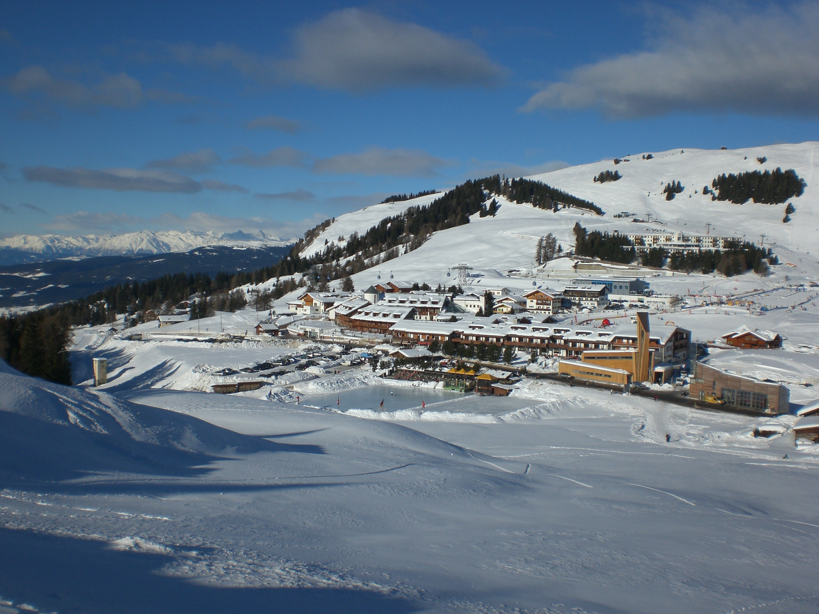 foto personale dicembre 2008